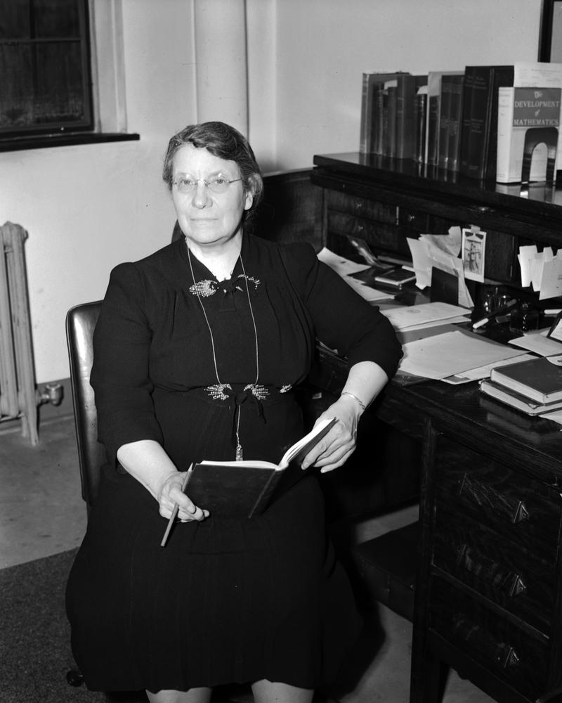 Agnes Erminia Wells